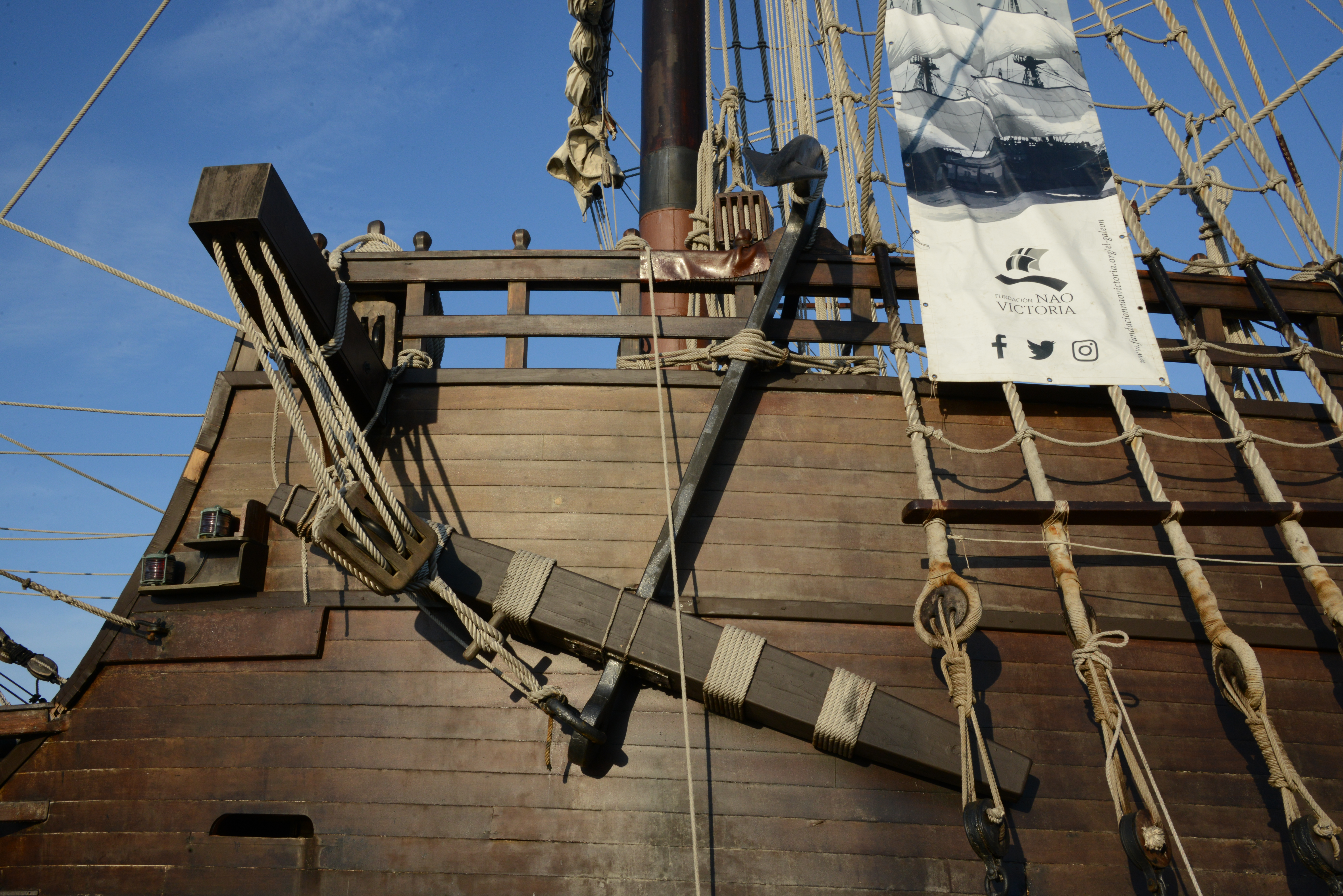 Le galion « Galeón Andalucía » (« El Galeón » marqué sur le navire) amarré dans le Bassin des Chalutiers lors de son escale à La Rochelle en juin 2018. La Rochelle, Charente-Maritime, France.